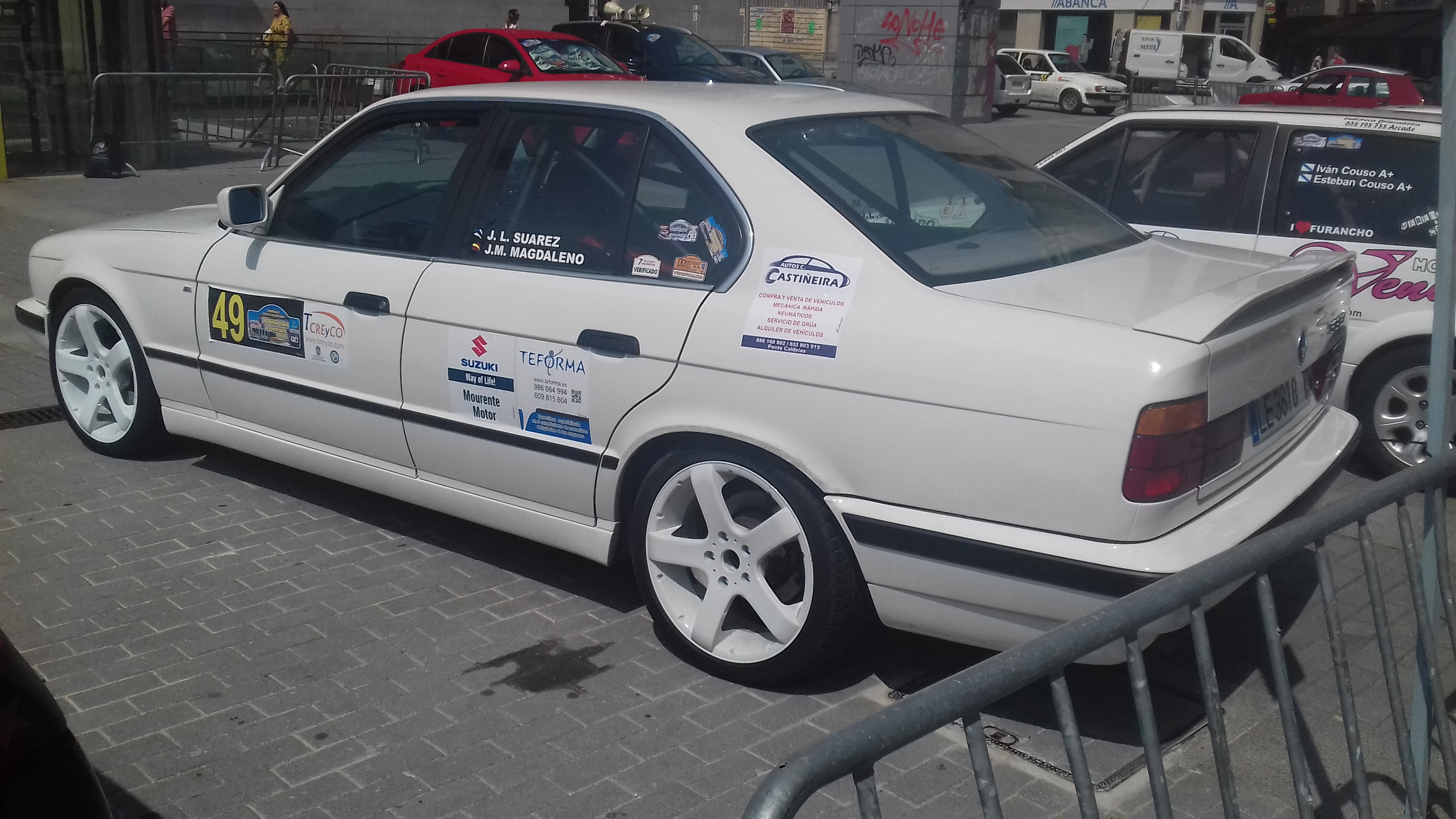 BMW 535 i pilotado por José Luís Suárez Serantes no parque pechado da Subida Cidade de Pontevedra 2018, na Praza do Concello de Pontevedra